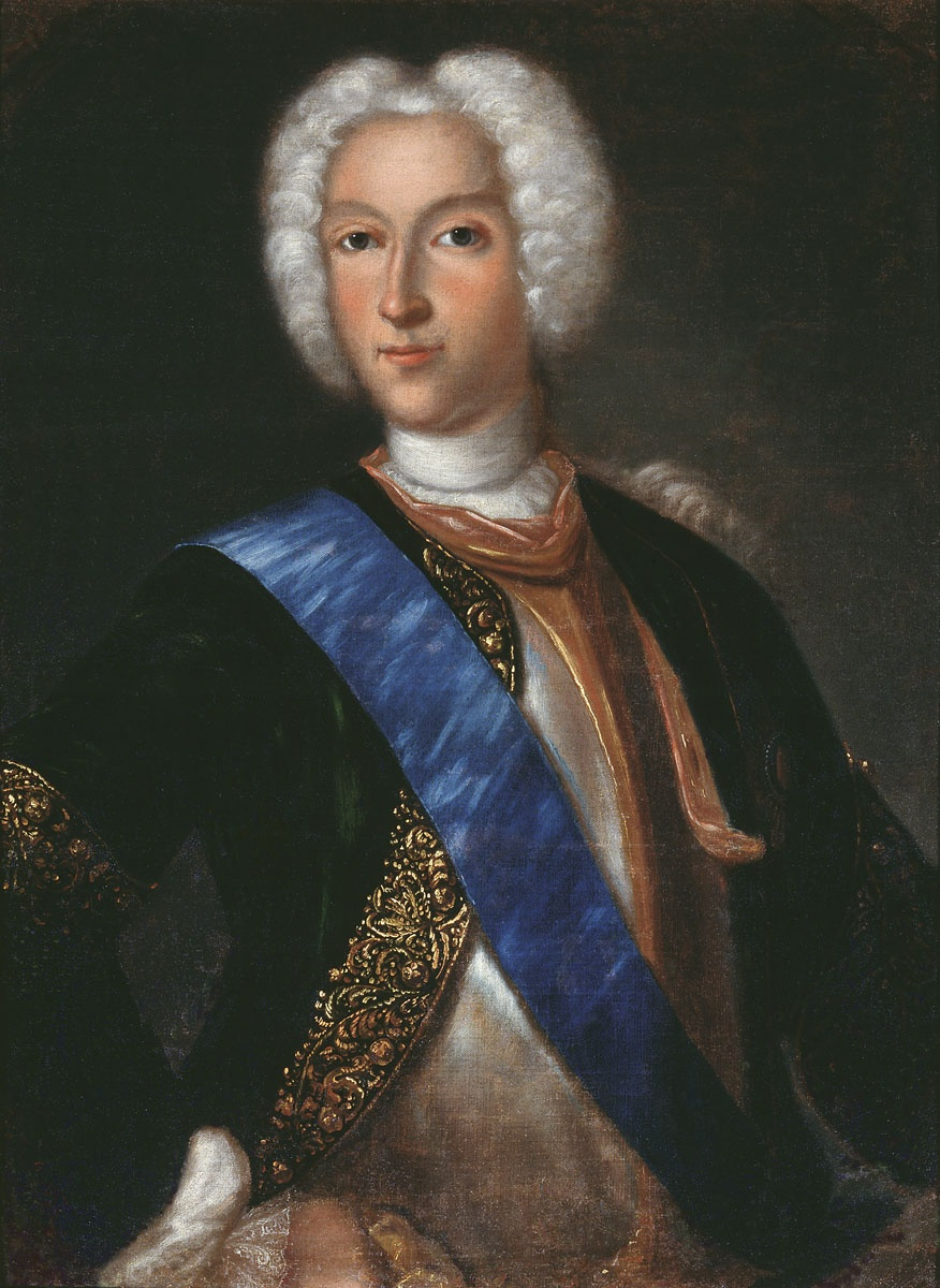 Portrait of russian emperor Peter II of Russia Материалы: холст, масло Размеры: 77 х 58 см Самарский областной художественный музей 1730-е